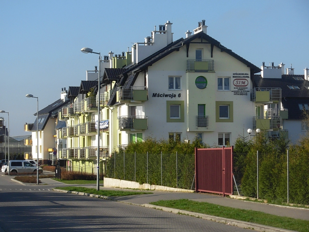 Osiedle Czyżkówko w Bydgoszczy